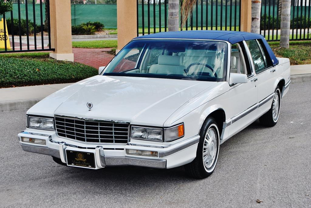 1993 Cadillac Sedan Deville